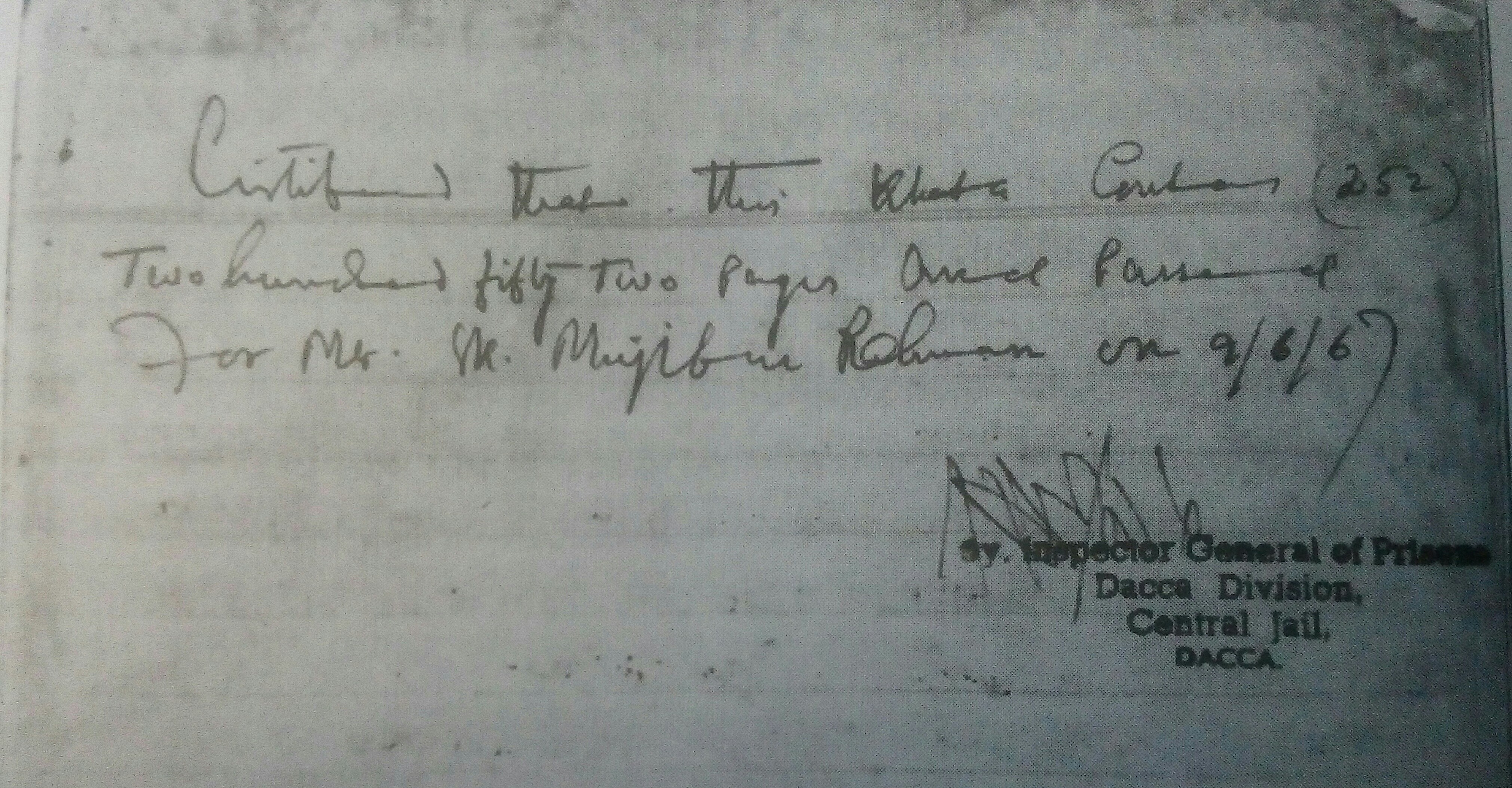 অসমাপ্ত আত্মজীবনী পাণ্ডুলিপির একটি খাতায় জেল কর্তৃপক্ষের স্বাক্ষর